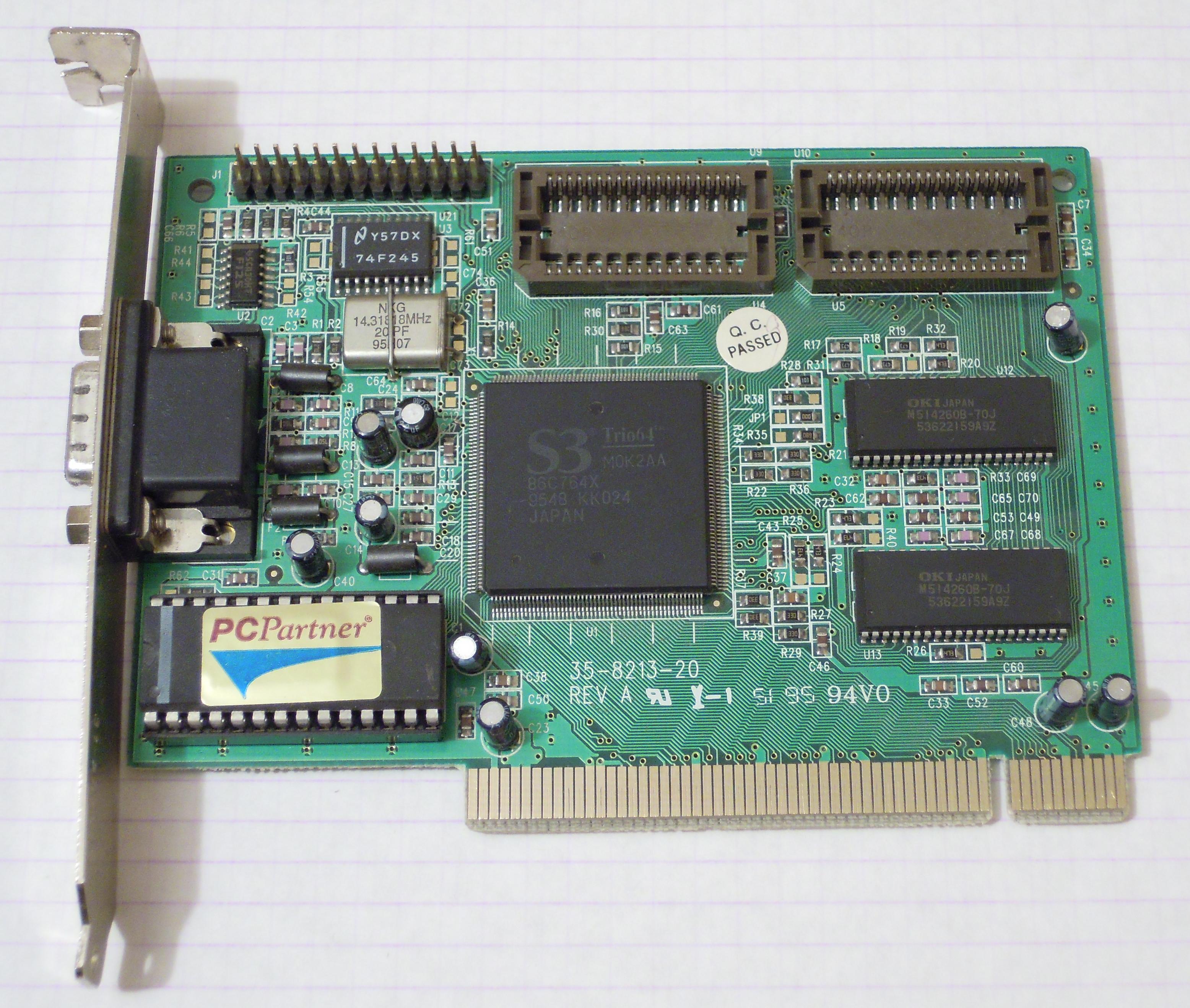 Видеокарта S3 Trio64, видимо PCI.